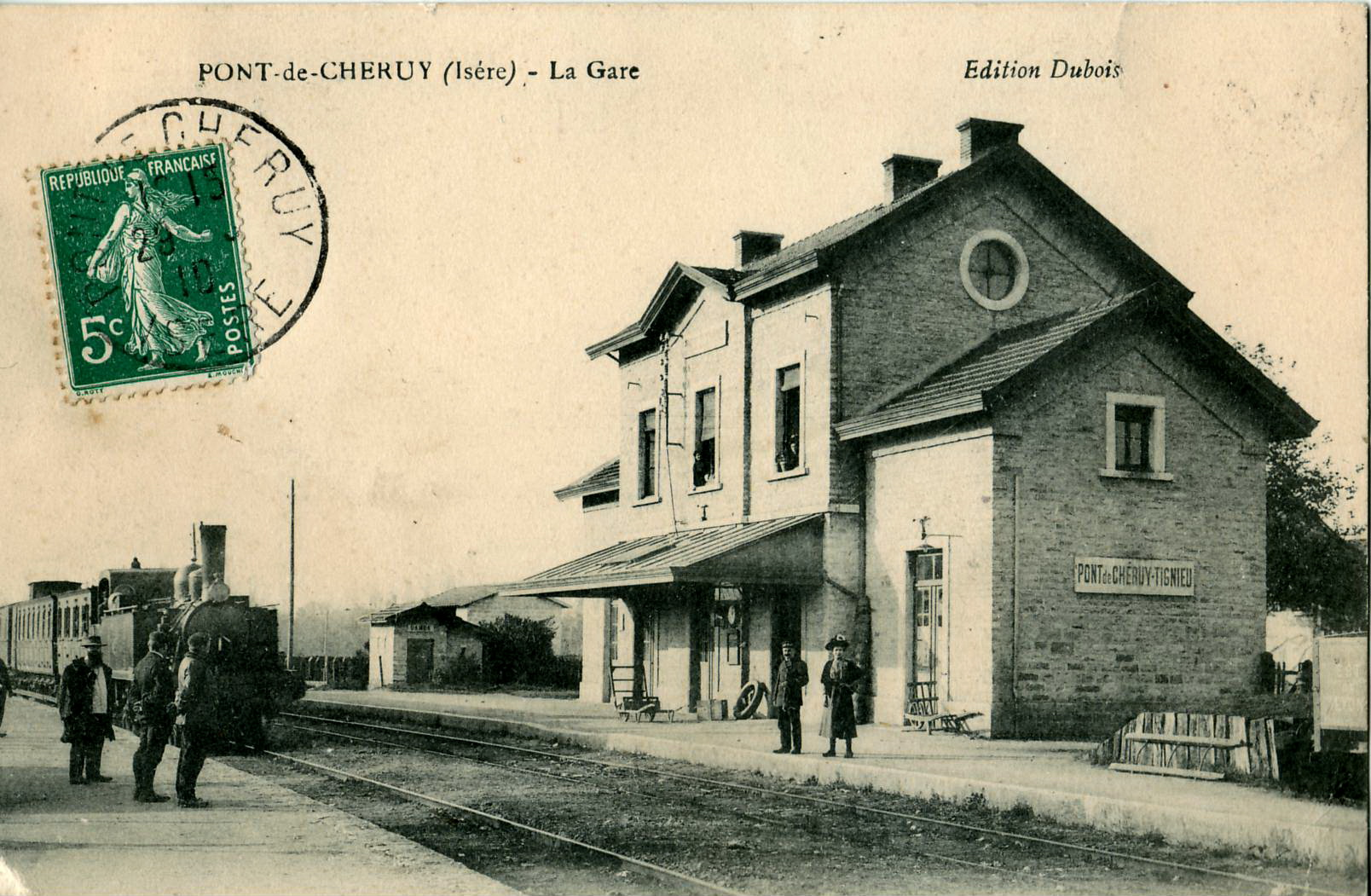 Carte postale ancienne éditée par DuboisPont-de-Chéruy : La gare (du Chemin de fer de l'Est de Lyon